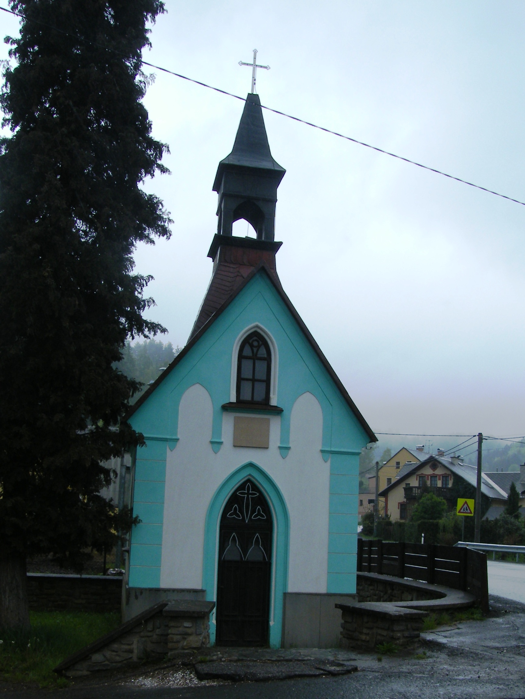 Kaple sv. Jana Nepomuckého (Dolní Štěpanice)